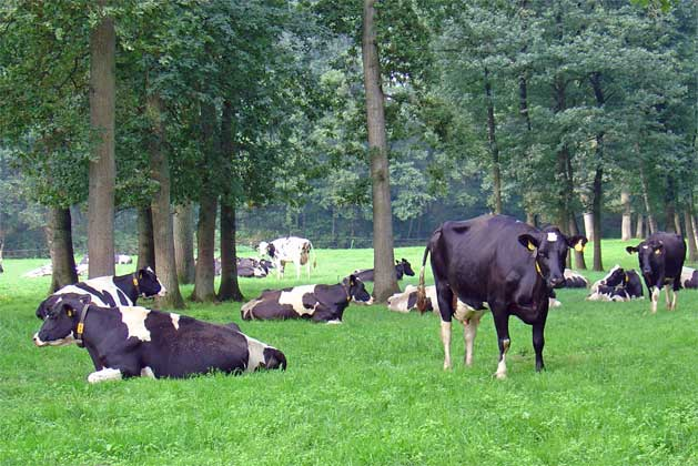 Koeien – Het landschap bij Junne (gemeente Ommen) te Overijssel.